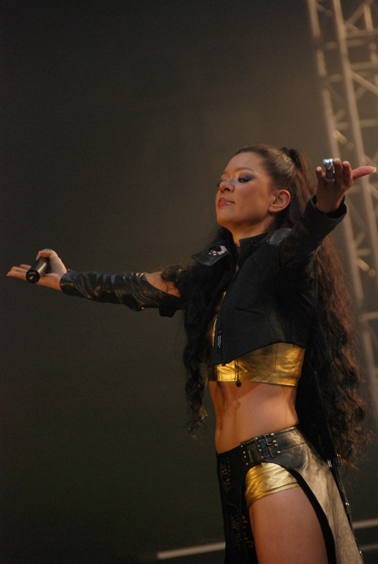 Ruslana...